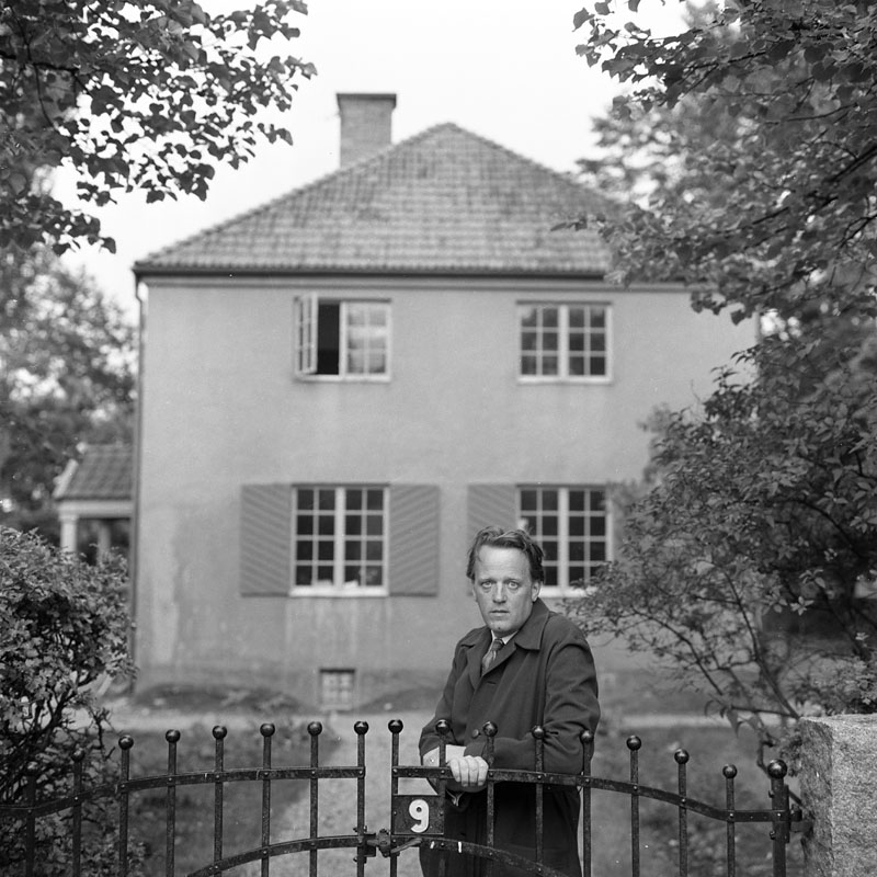 Författaren Lars Ahlin (1915-1997) framför sitt hem Villa Vingarna på Korsvägen 9 i Äppelviken, Bromma.